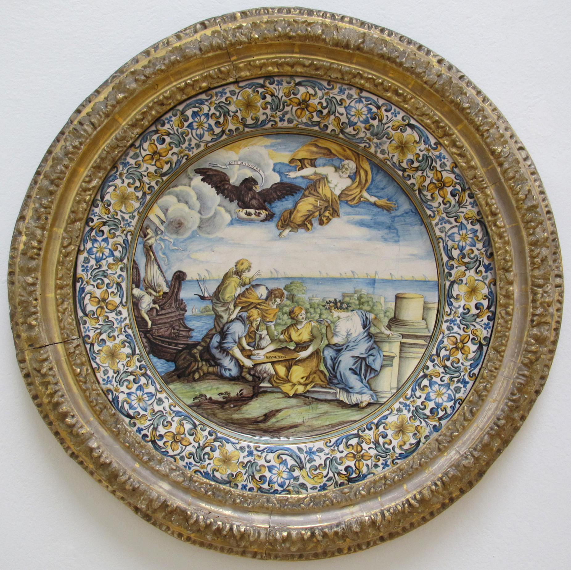 Castelli, carmine gentili, piatto con allegoria degli illuminati, inizio del XVIII sec